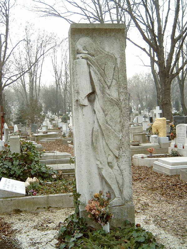 Boncza Berta (Csinszka) sírja (Vilt Tibor, 1937). Modern, Mészkő Dombormű. Támaszkodó nő alak. Budapesten. Farkasréti temető: 7/4-1-25.